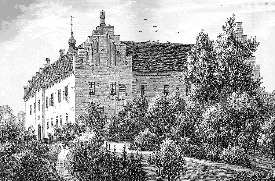 'Dansk: Kokkedal Slot i Torslev Sogn, (Øster Han Herred, Hjørring Amt) er en nordjydsk herregård, og dens historie går helt tilbage til middelalderen.